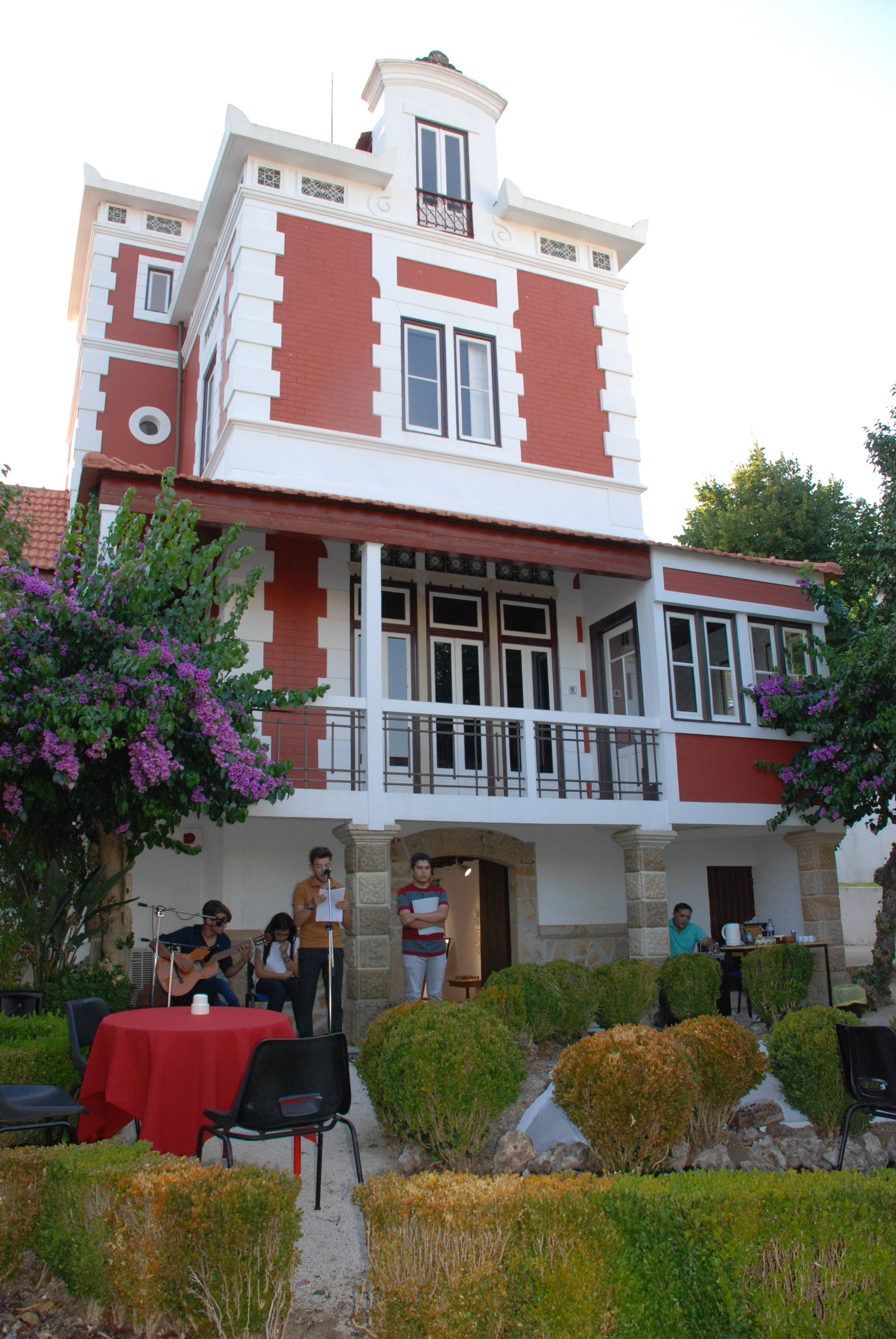 Casa onde José Malhoa viveu e pintou, aquando de uma tarde de declamação de poesia.